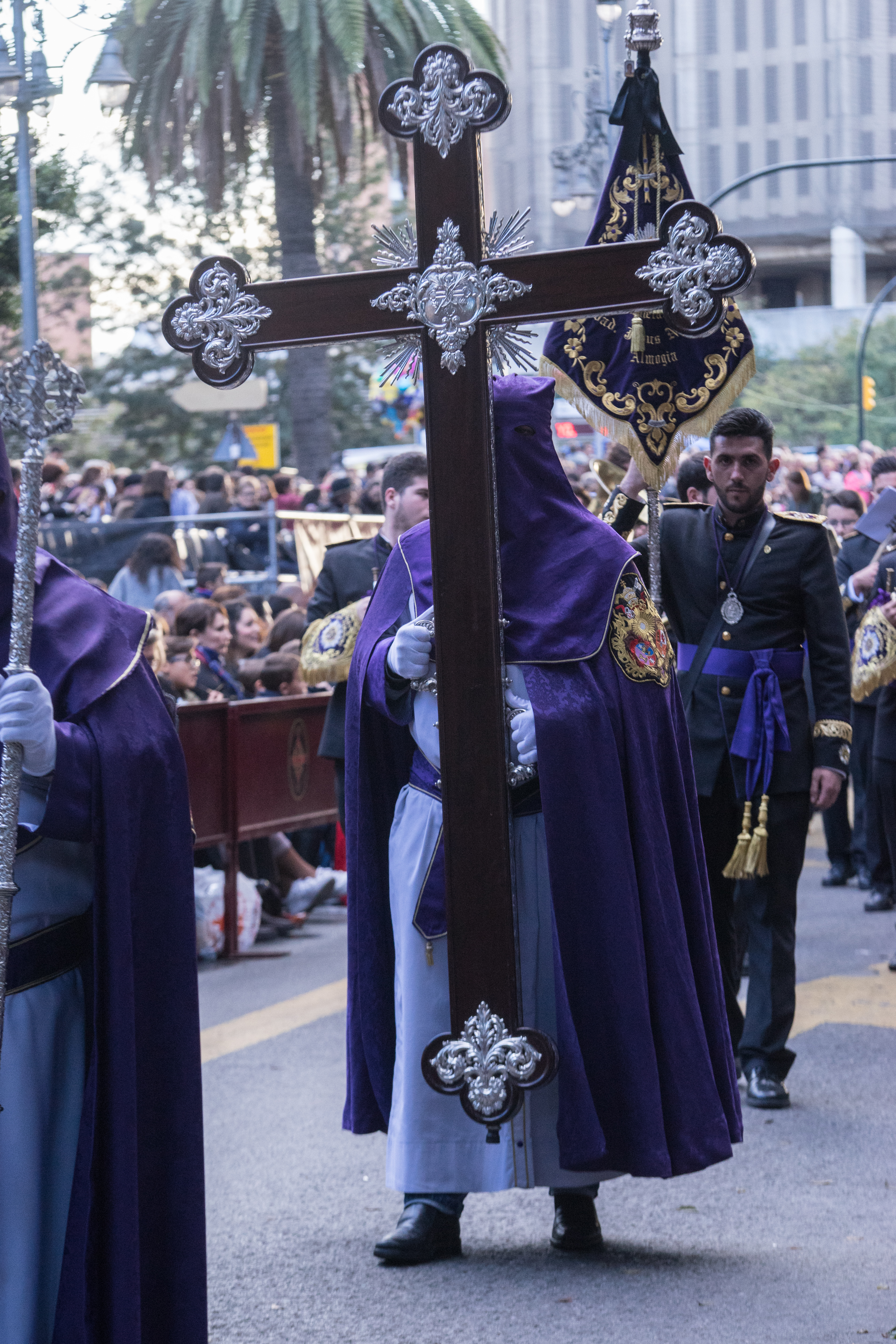 Cruz Guía de la Pontificia, Muy Ilustre y Venerable Archicofradía Sacramental y Seráfica de Nuestro Padre Jesús Orando en el Huerto, Nuestra Señora de la Concepción, San Juan Evangelista y Nuestra Señora de la Oliva This is a photography of a Folklore festival in Spain (Wikidata id Q9075883).